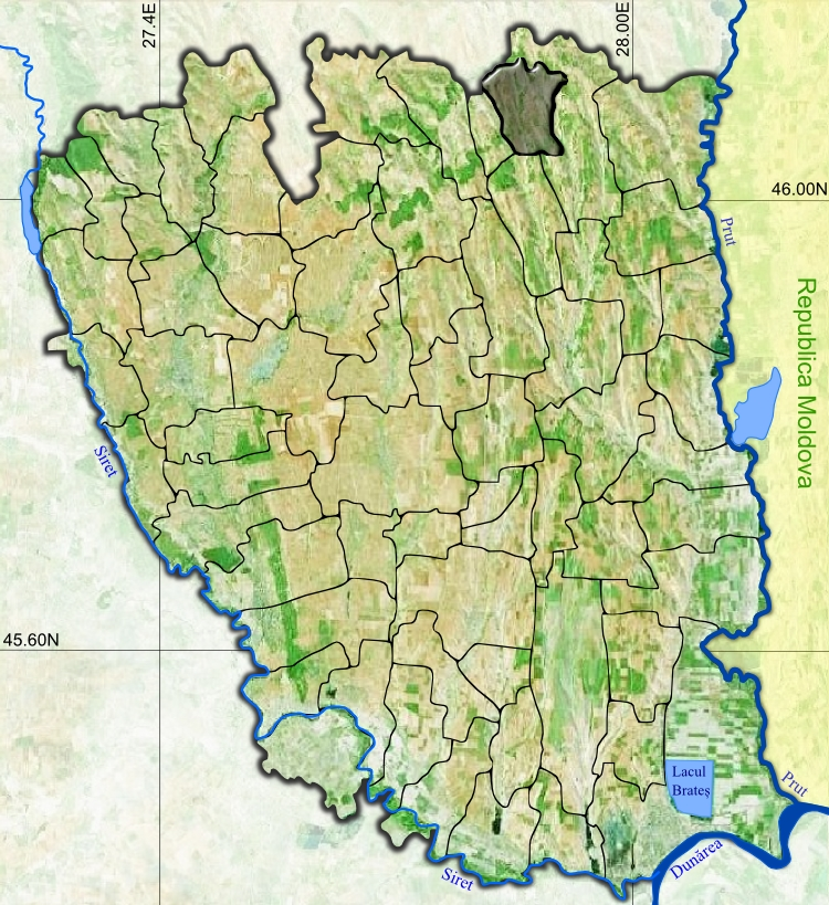 Beresti jud Galati.